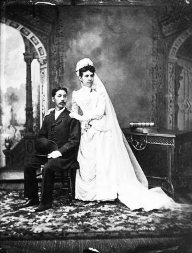 Fotografía del matrimonio de Manuel de Jesús Yas.